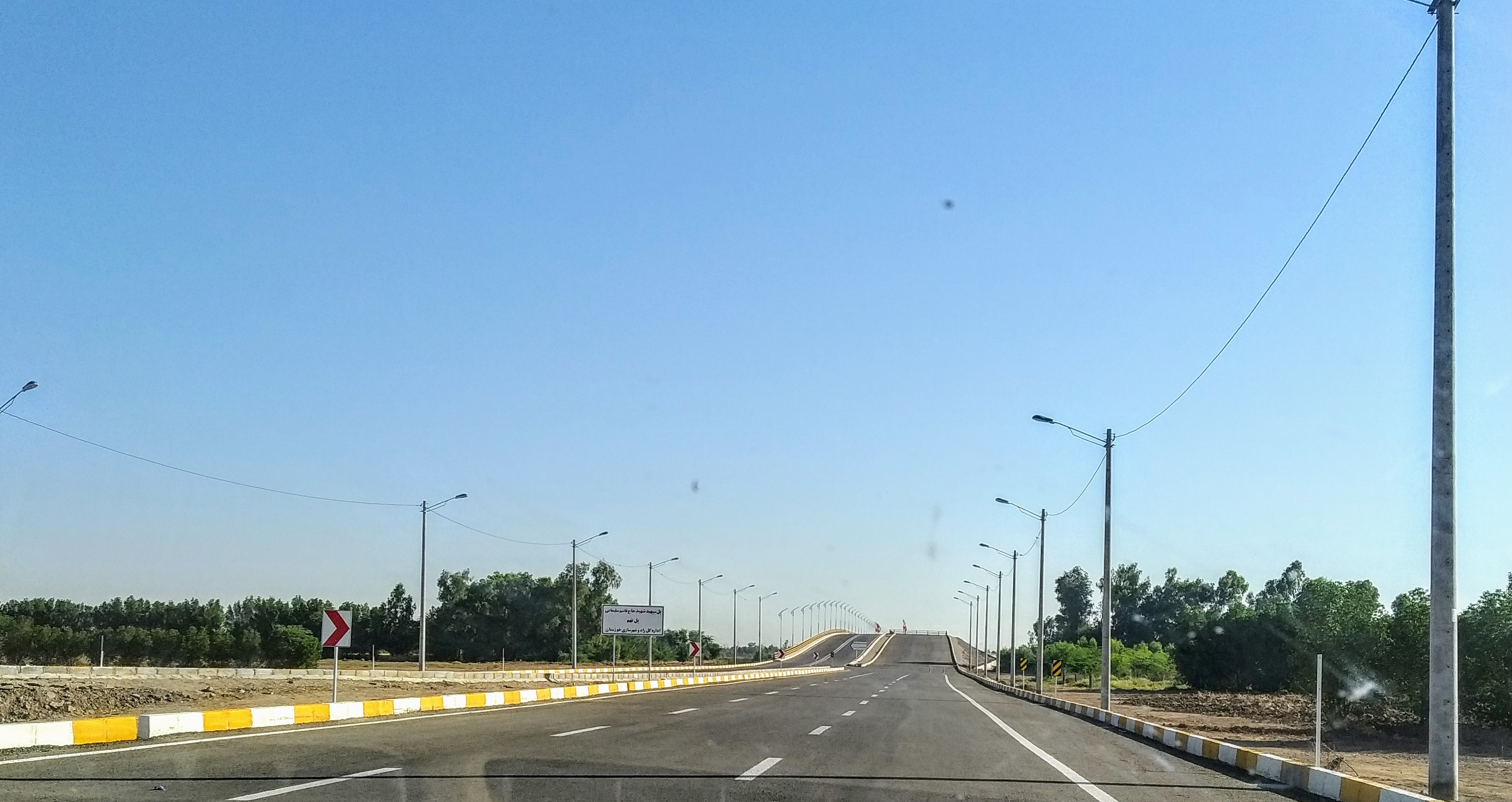 پل نهم اهواز